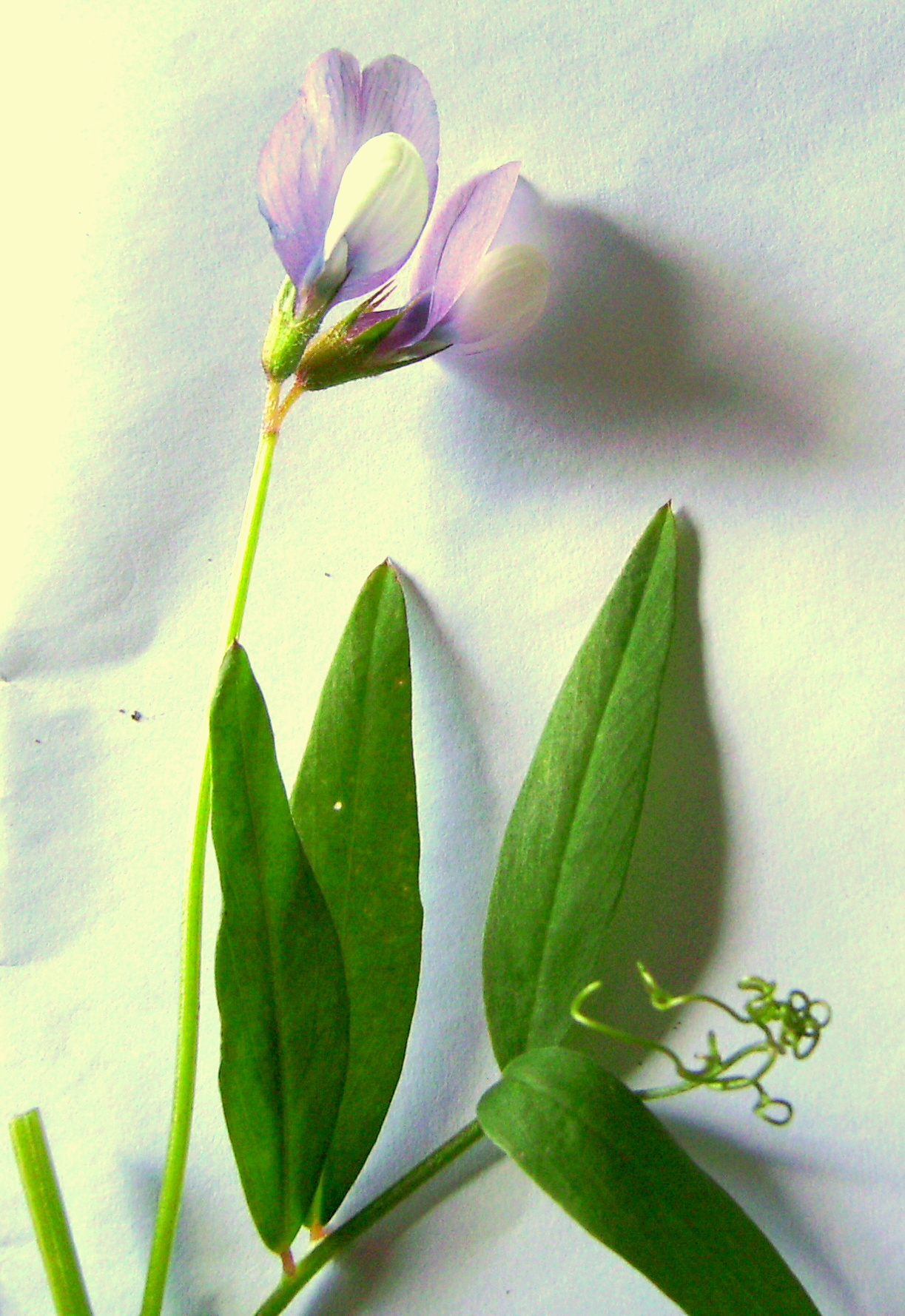 Vicia bithynica, Castelltallat, Catalonia (840 m asl)